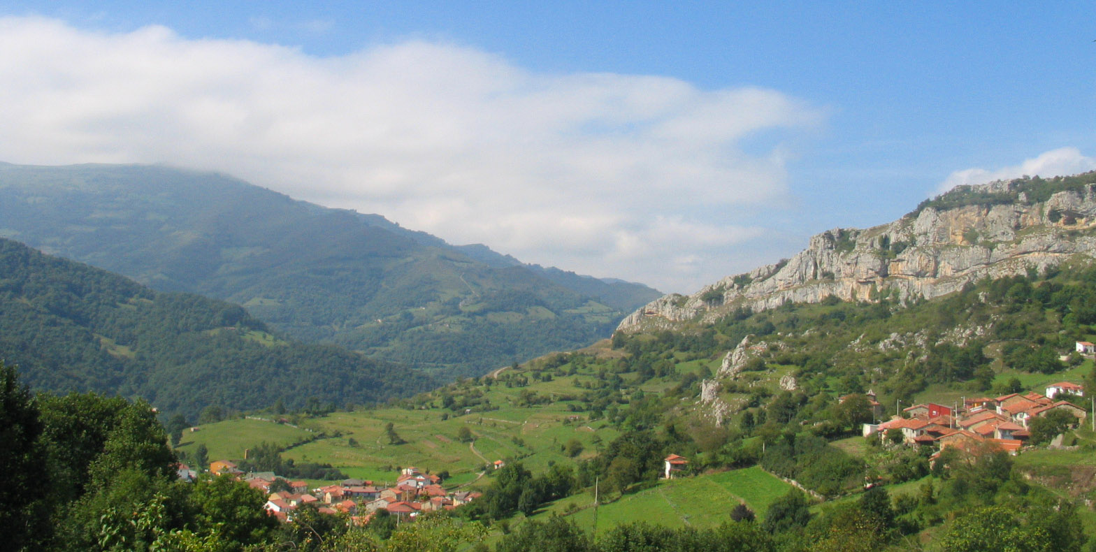 vista del pueblo de Pelúgano barro Baxo y barro Cima desde el cementerio